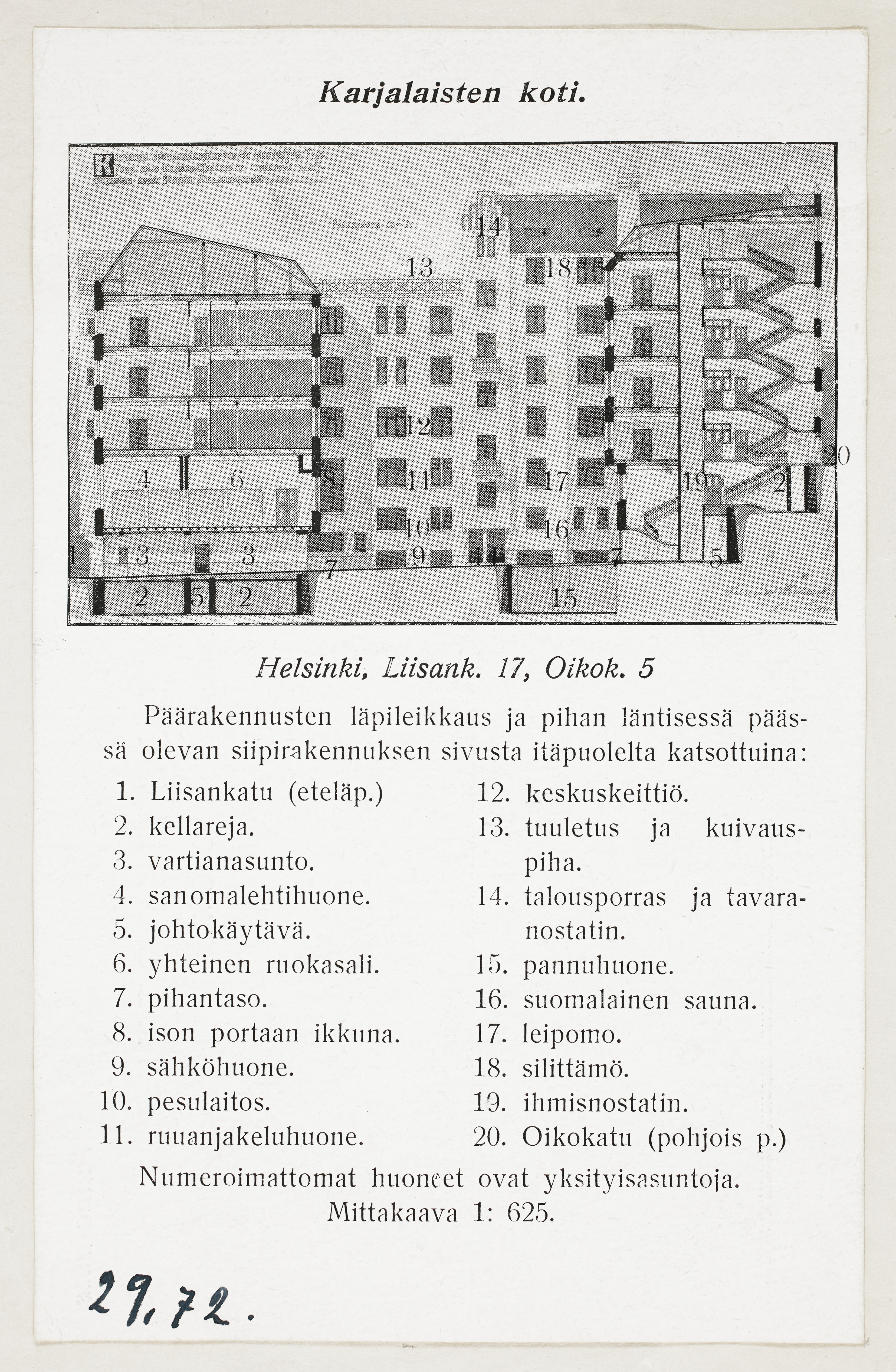 Karjalaisten kodin rakennuspiirustus. Liisankatu17, Oikokatu 5 (läpileikkaus ja siipirakennuksen sivusta).